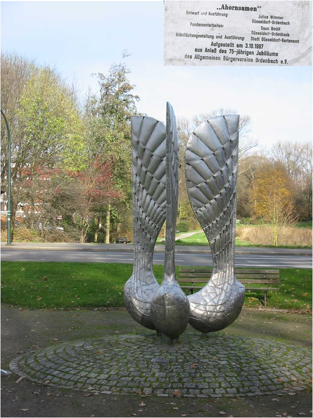 Ahornsamen – ein seltenes Motiv für ein Kunstwerk